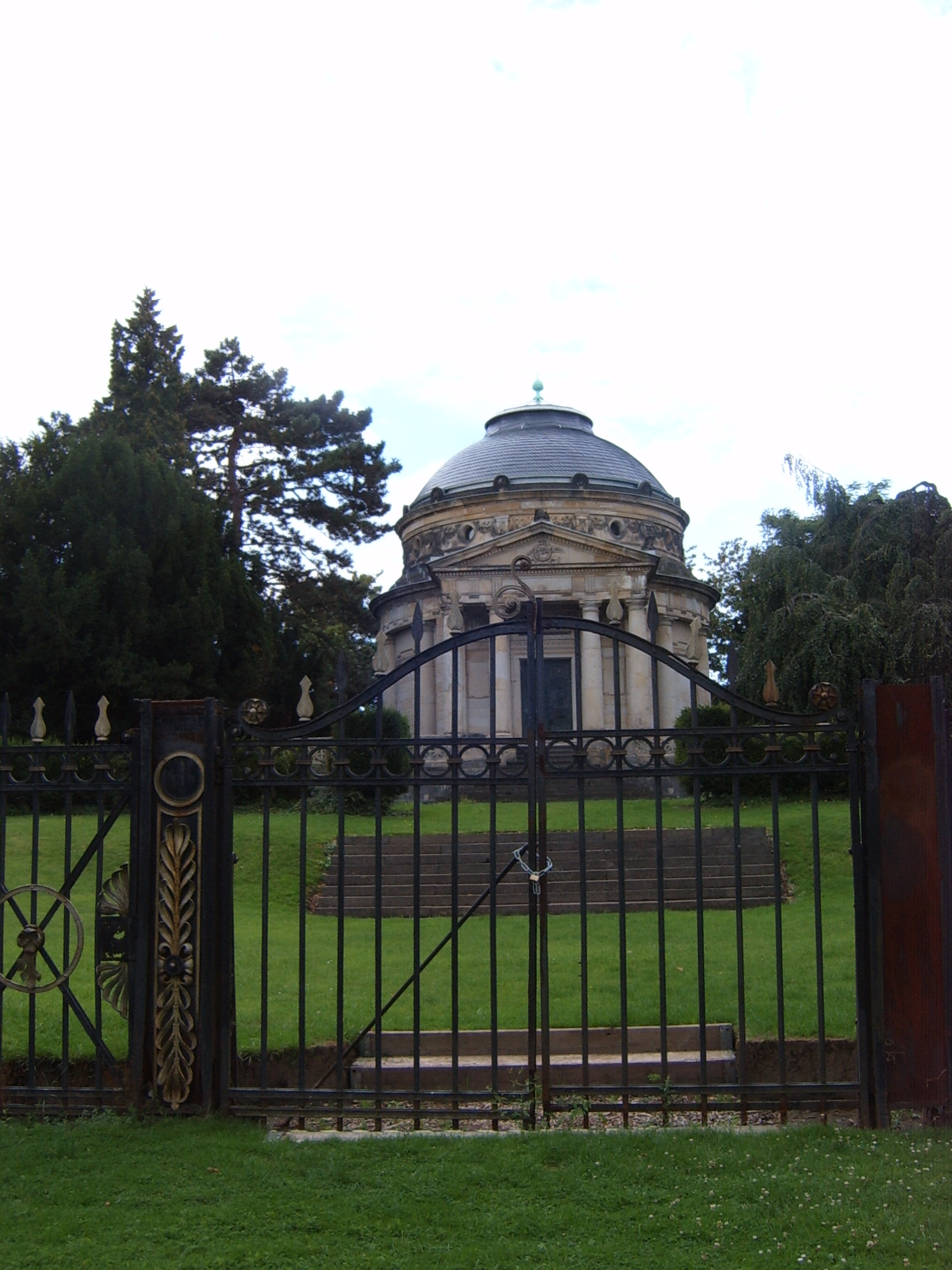 Mausoleum von Carstanjen, Auerhofstraße, Plittersdorf, Bad Godesberg